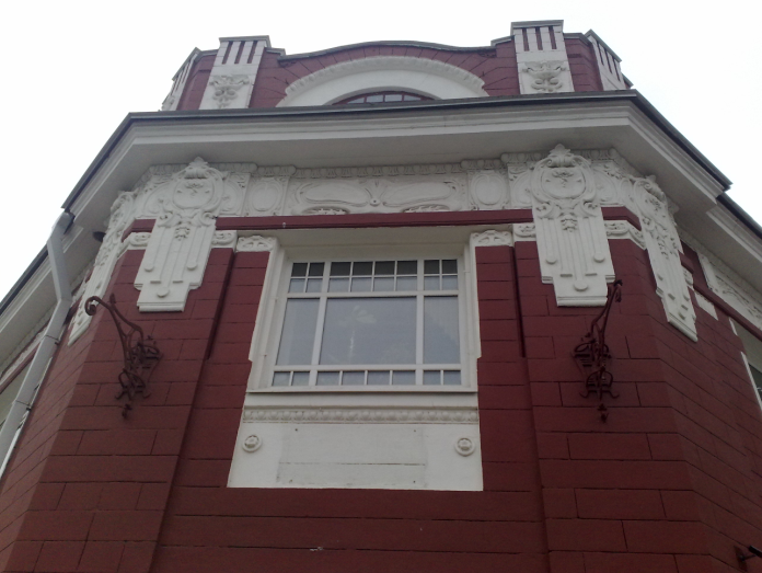 Лепнина Торгового дома Ижболдина Д. Г. в Перми (сейчас Центр творчества "Росток")